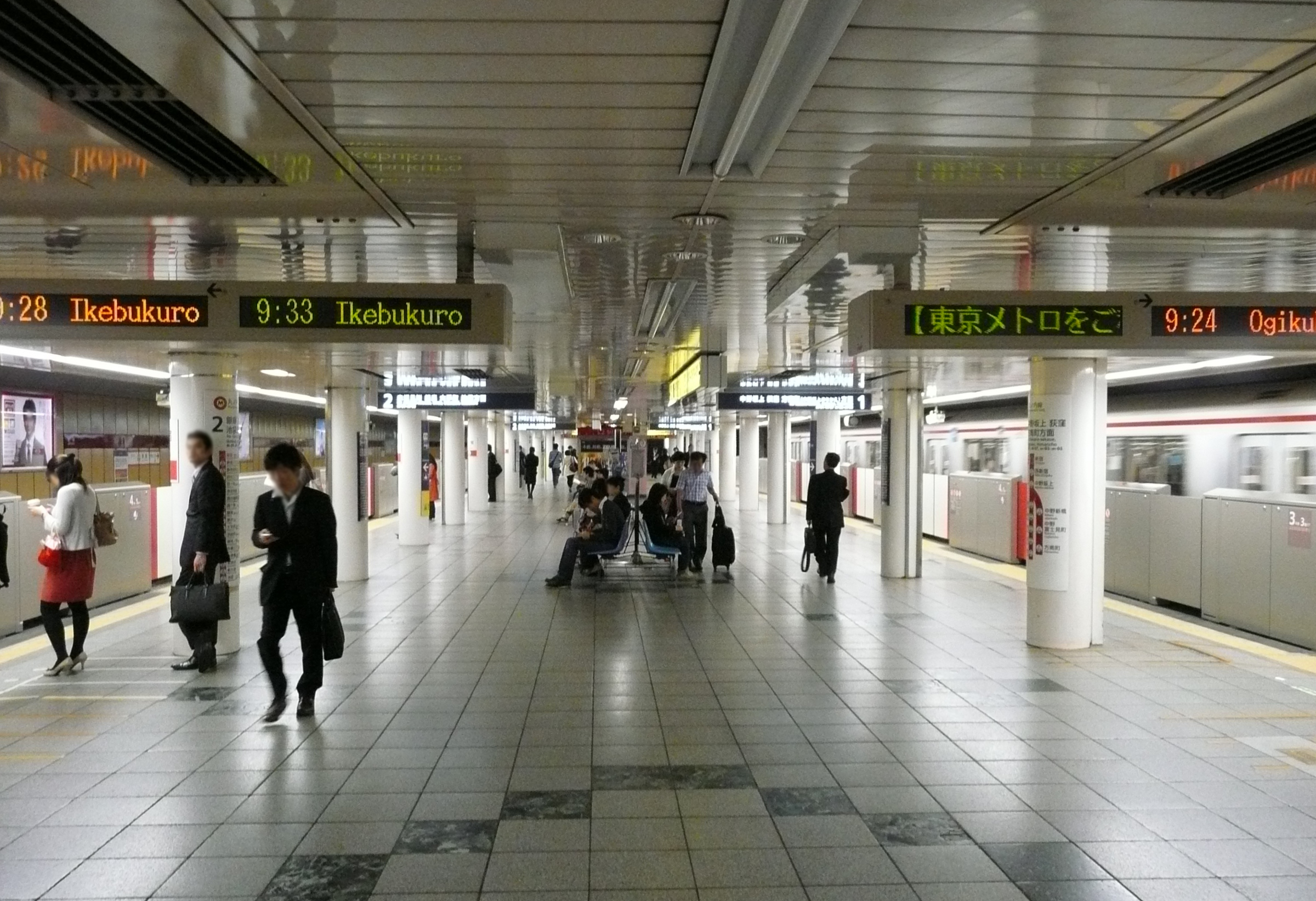 新宿駅丸ノ内線ホーム